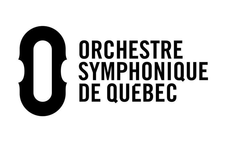 alternative logo of the Orchestre Symphonique de Québec (since 2017)